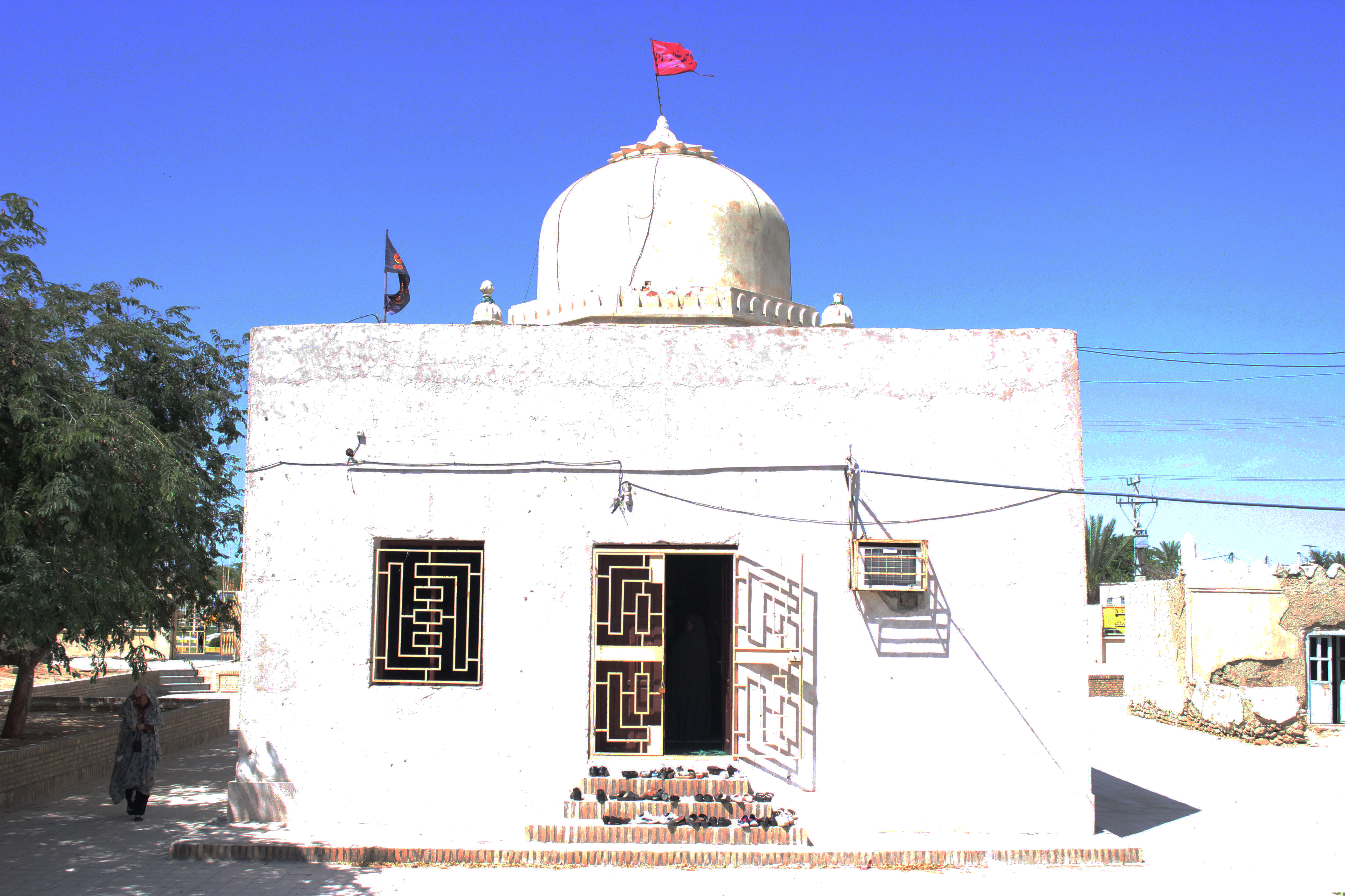 امامزاده سید غلامرسول